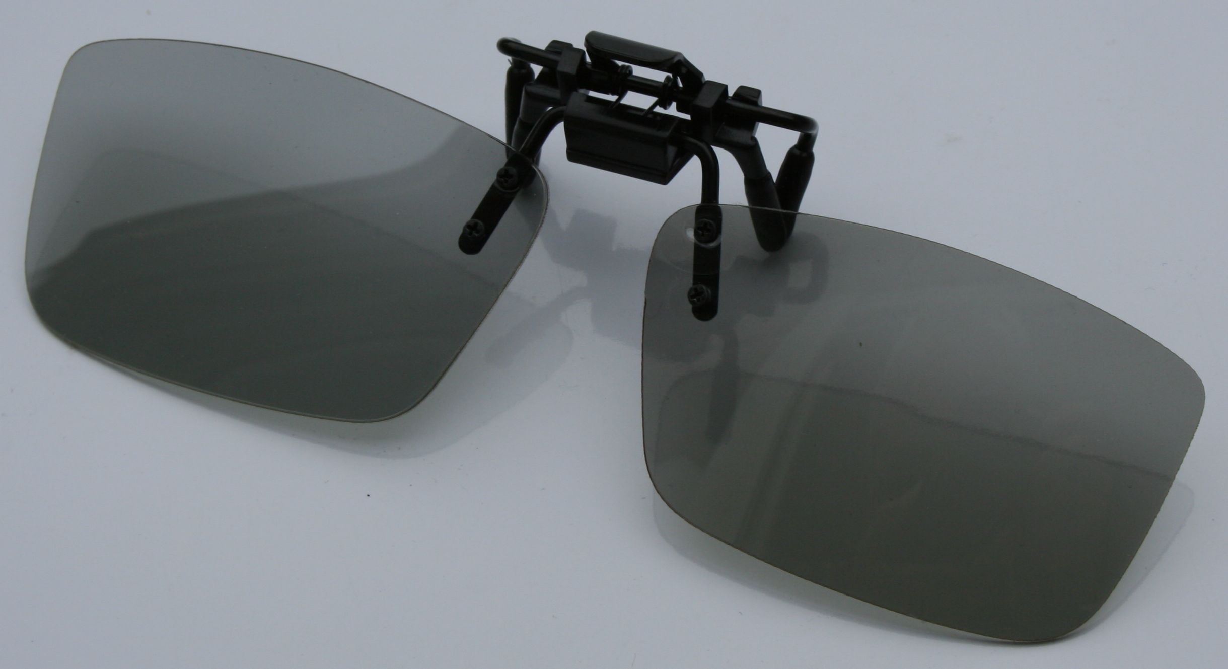 Ansteckbrille für Real D